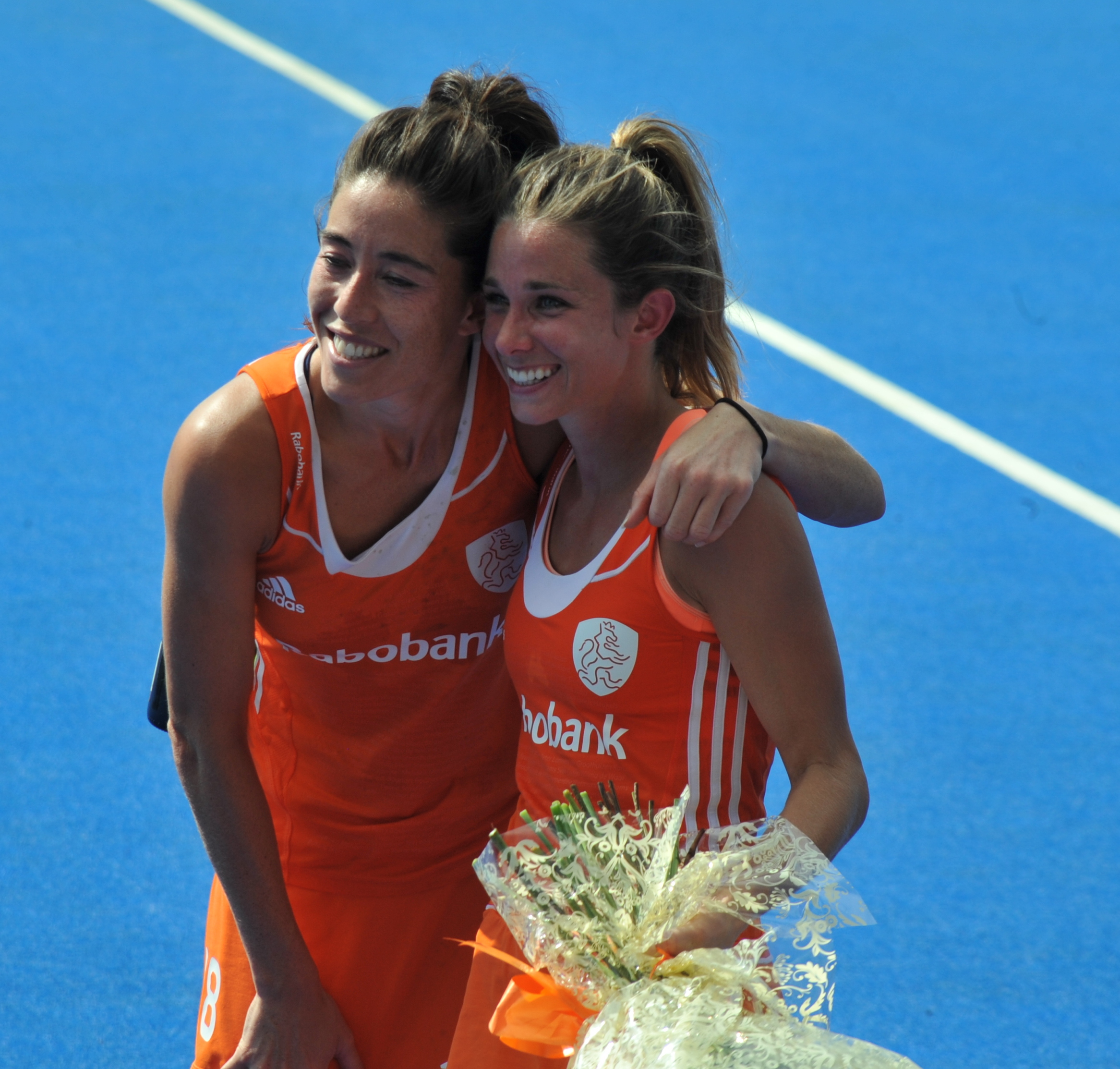 Naomi van As and Ellen Hoog